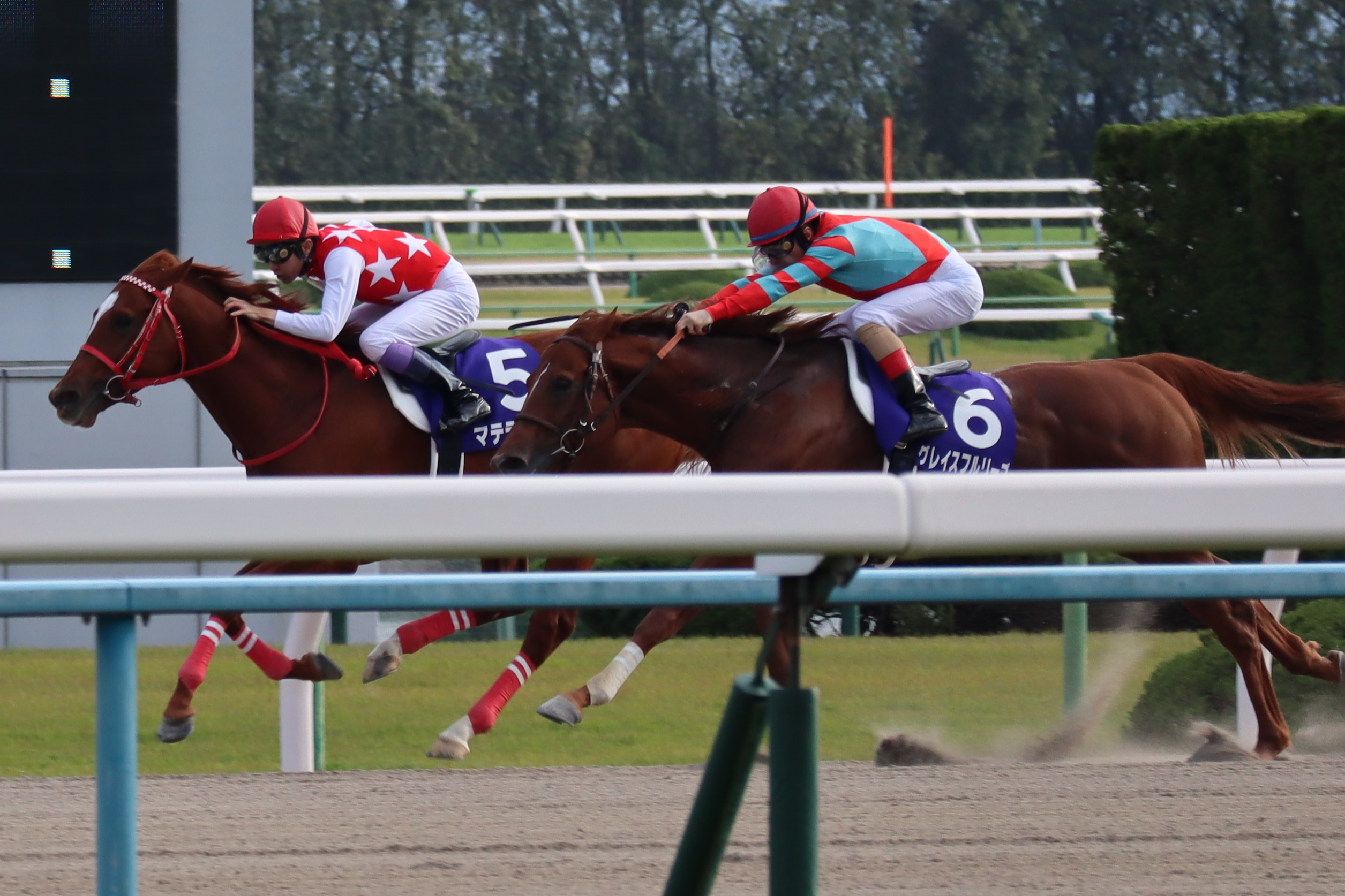 第18回JBCスプリントゴール前